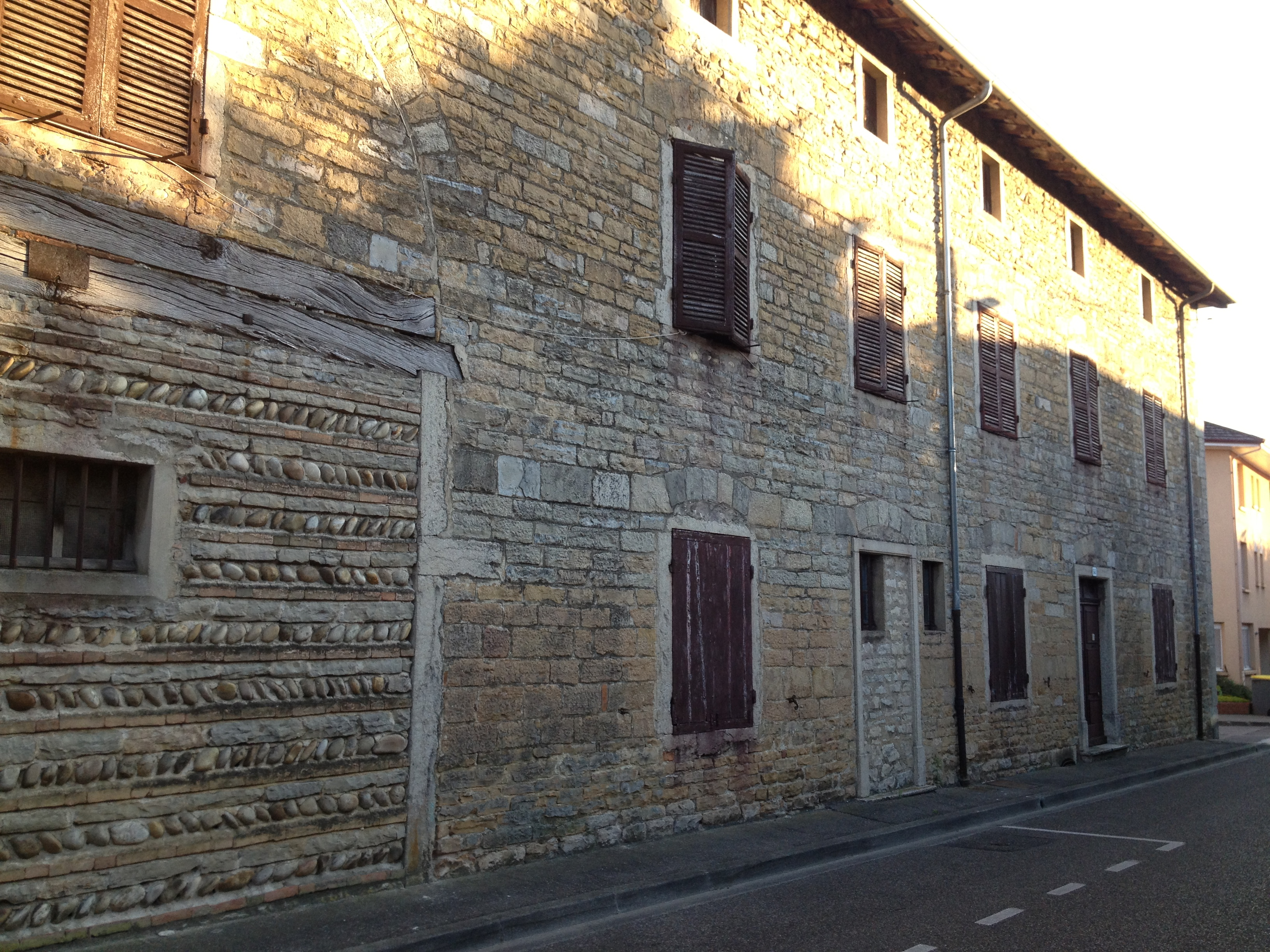 Maison Delorme, côté rue centrale à Beynost.